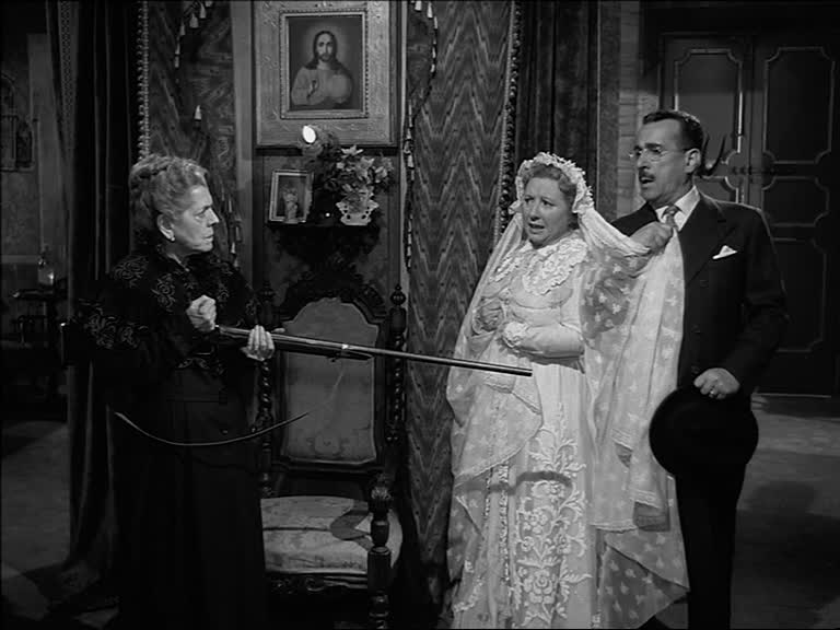 Screenshot dal film La nonna Sabella (1957) di Dino Risi.